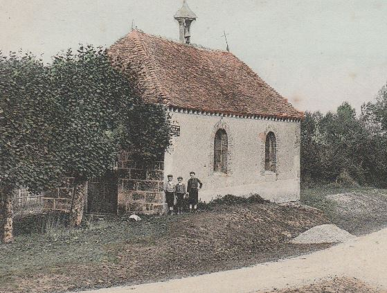 Ancienne chapelle de la Roche à Isle-Aumont début du XXe. E